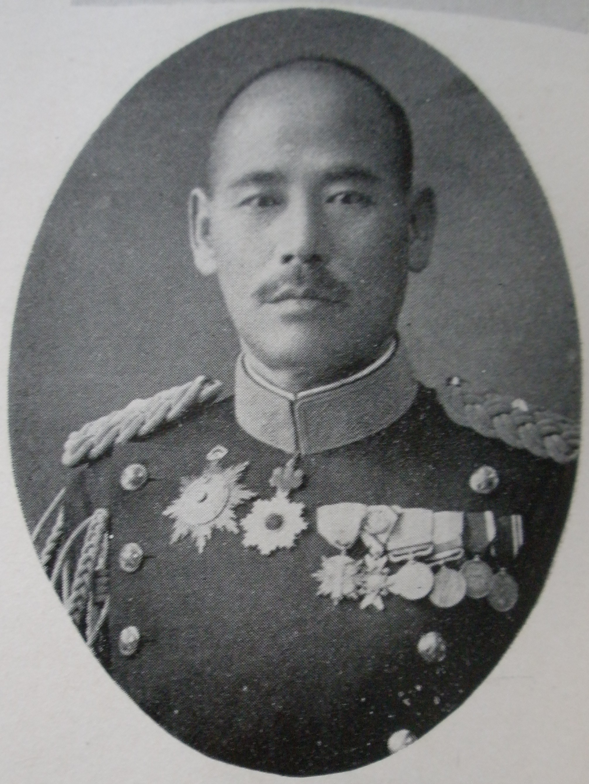 陸軍少将・男爵名和長憲